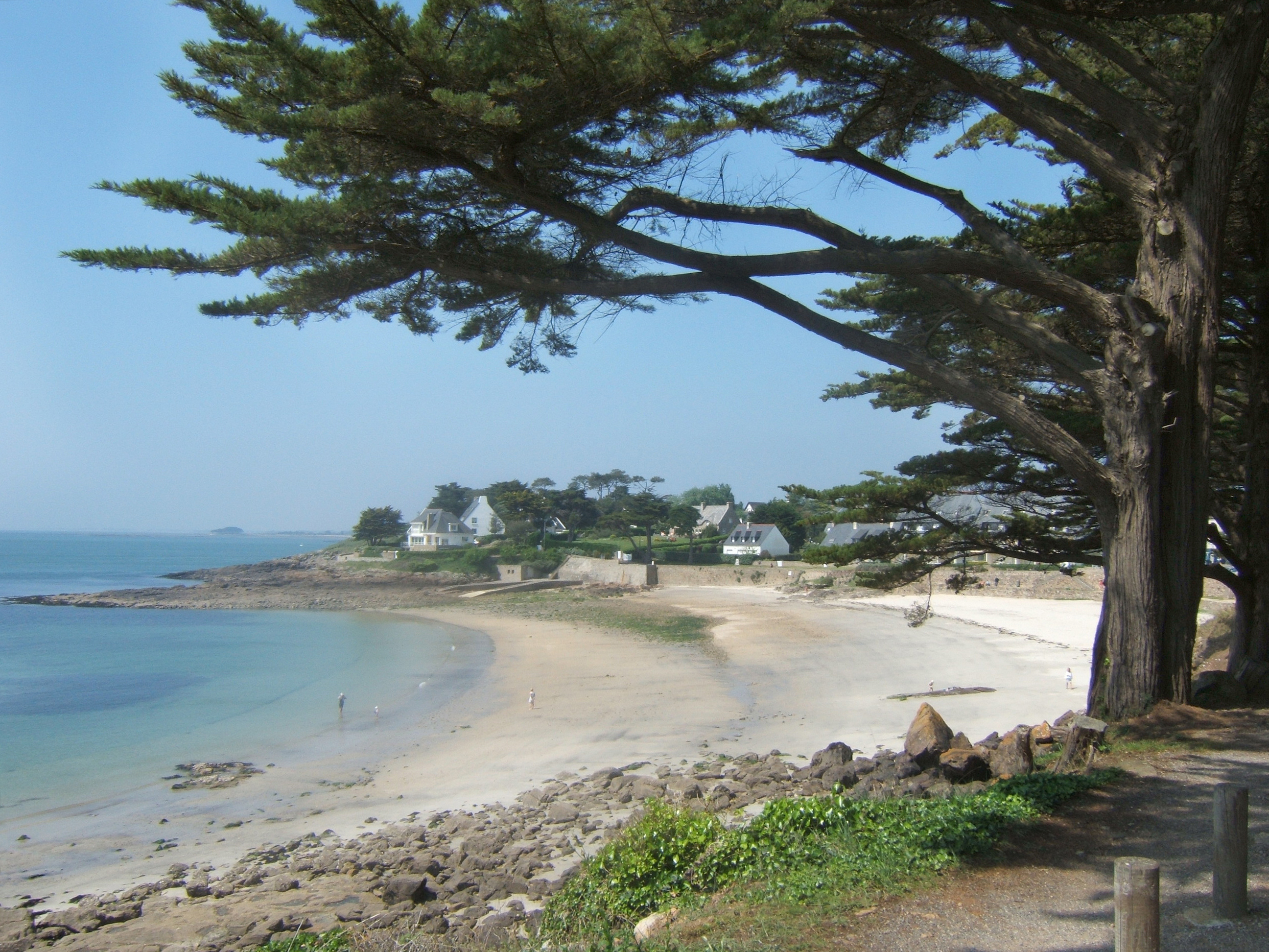 La plage au sud de Port-Navalo.